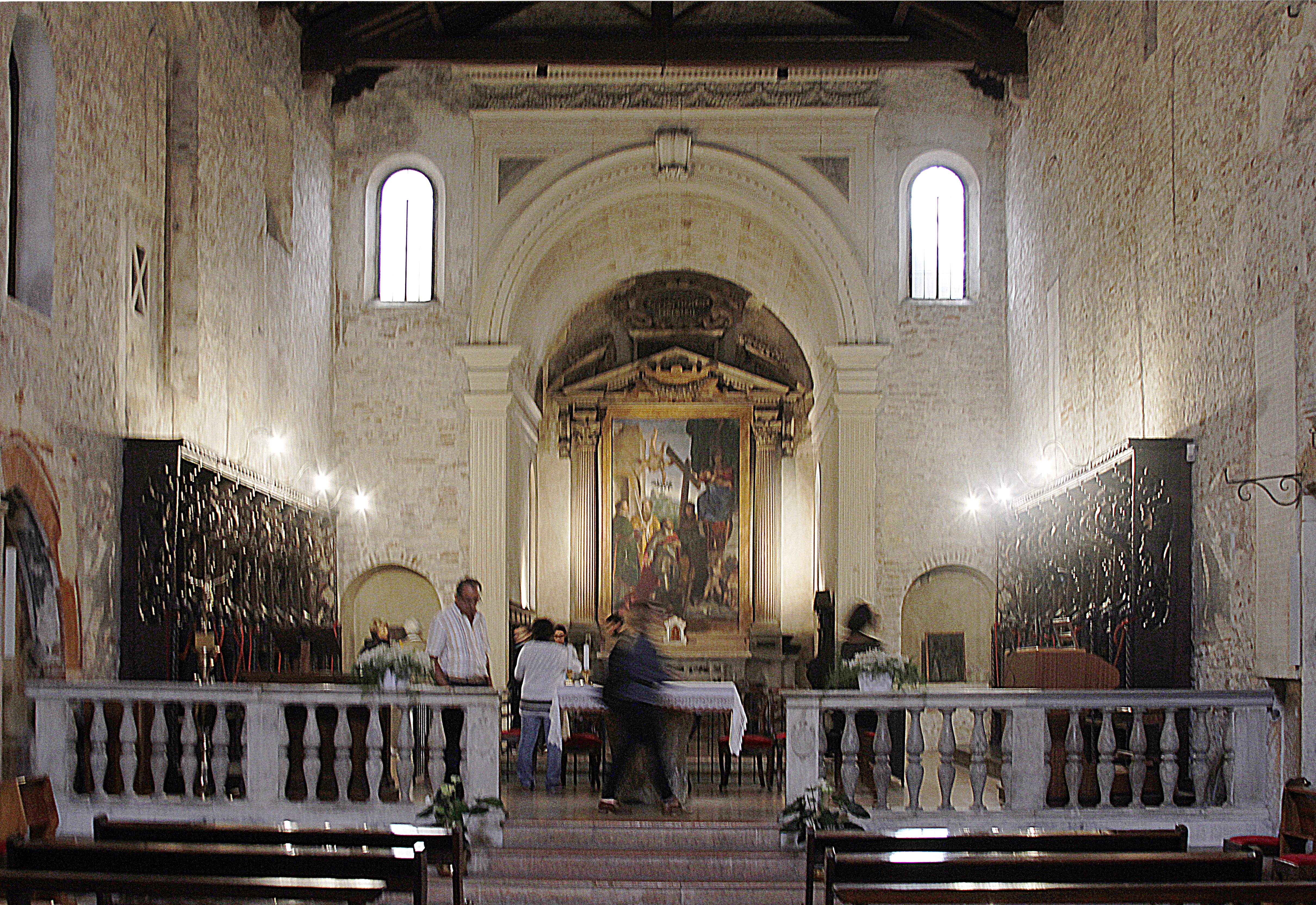 Sant'Elena - Verona